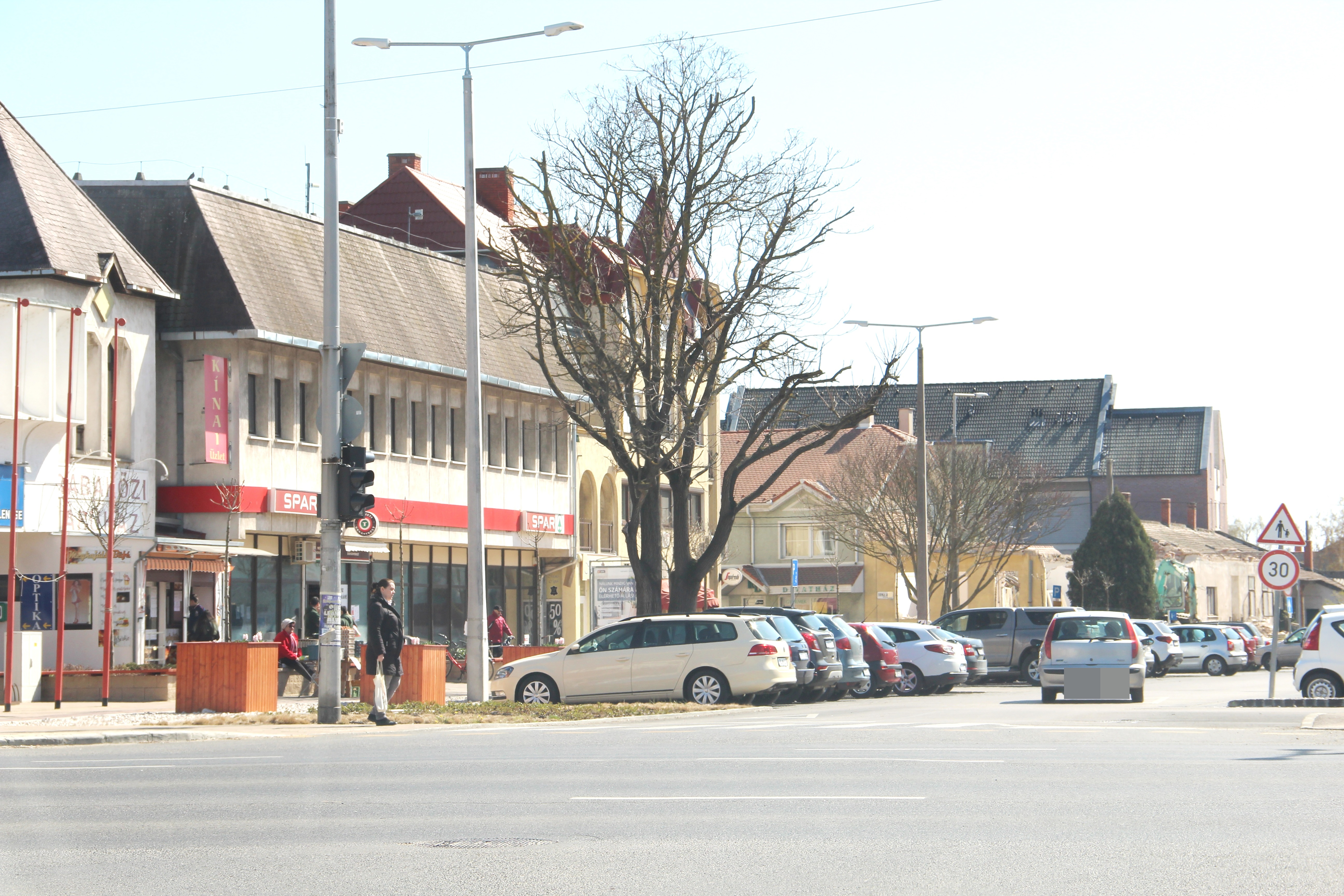 Mártírok tere, Csorna